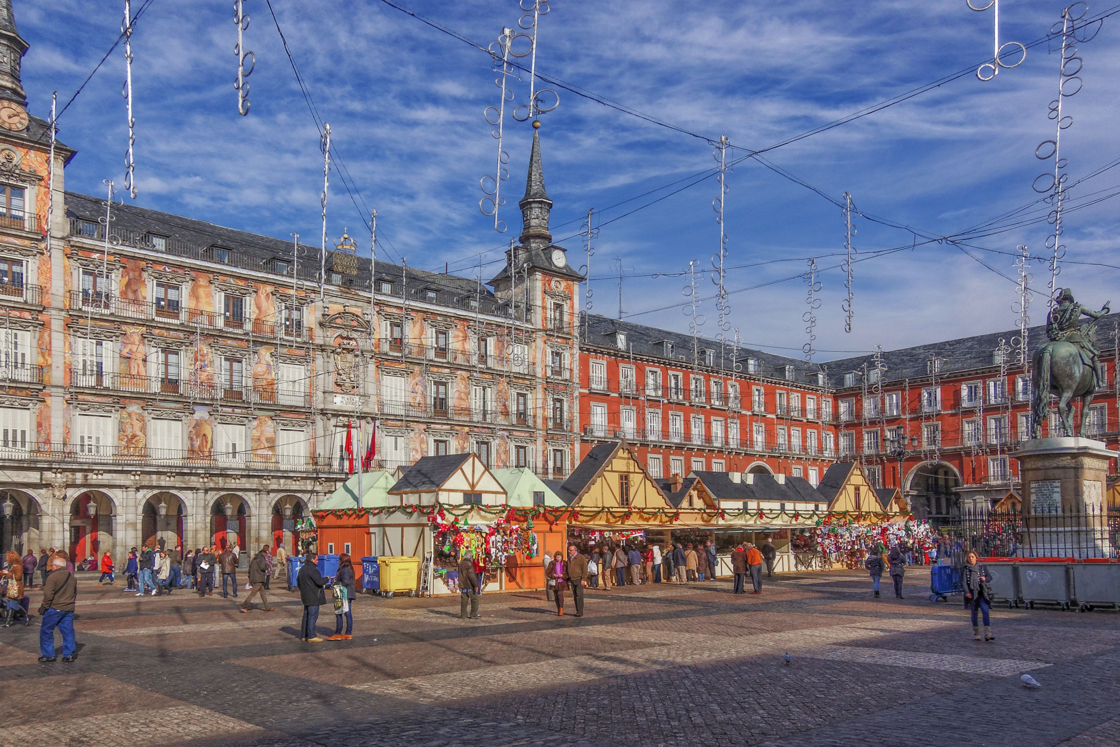 Mercado de navidad en Plaza Mayor con la Casa de la Panadería de fondo, Madrid.